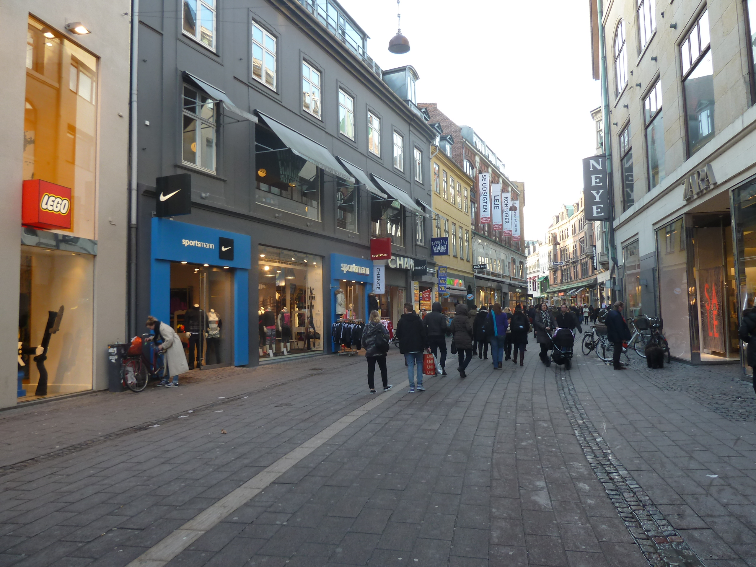 The street Vimmelskaftet in Indre By in Copenhagen.